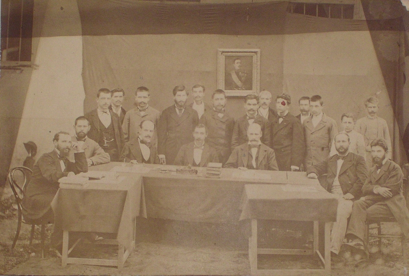 Окръжният съд, част от почетните му членове и мировите съдии. Плевен, 8 октомври 1880 г. /из фонда на РИМ – Плевен/